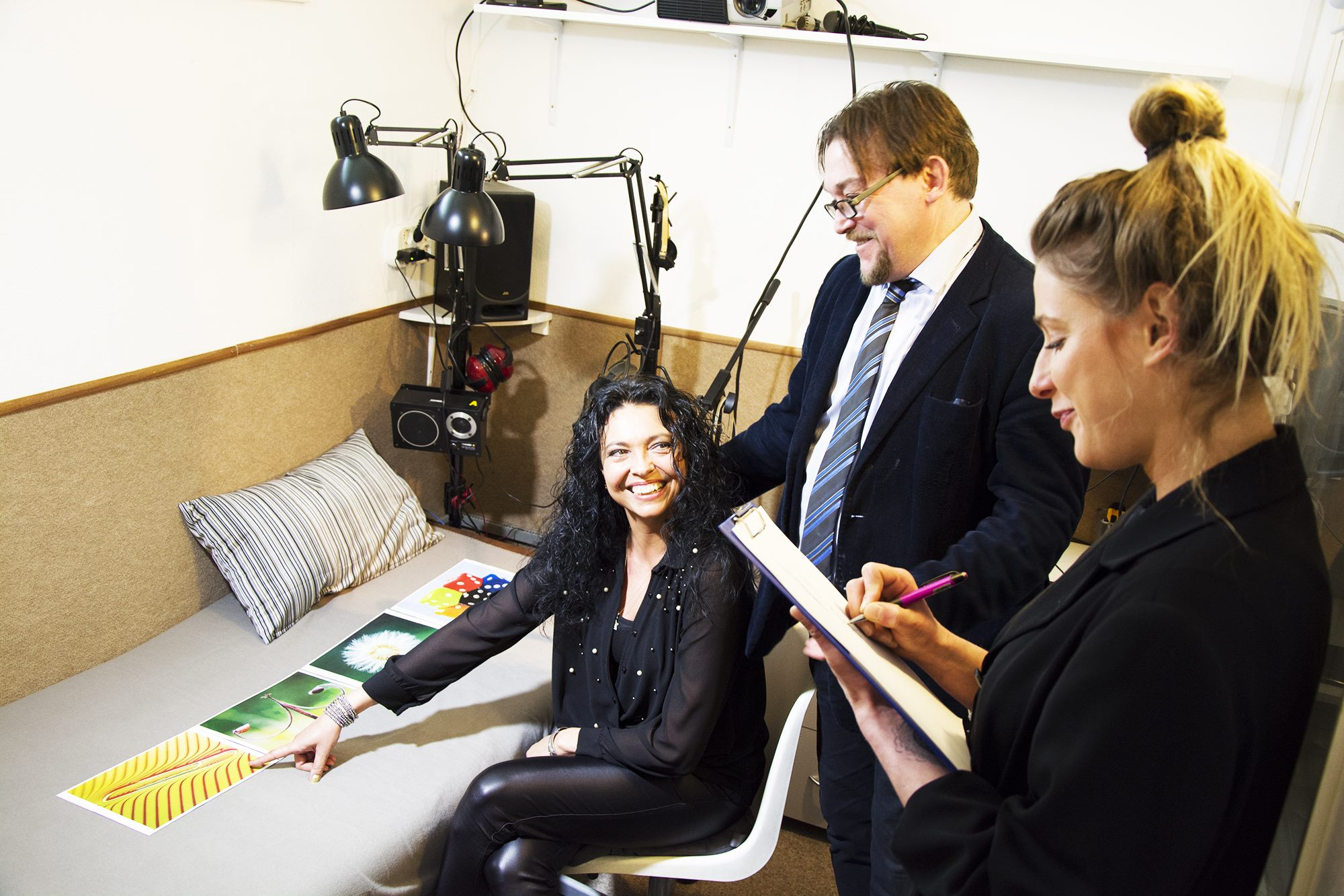 Paulinyi Tamás labormunka alatt